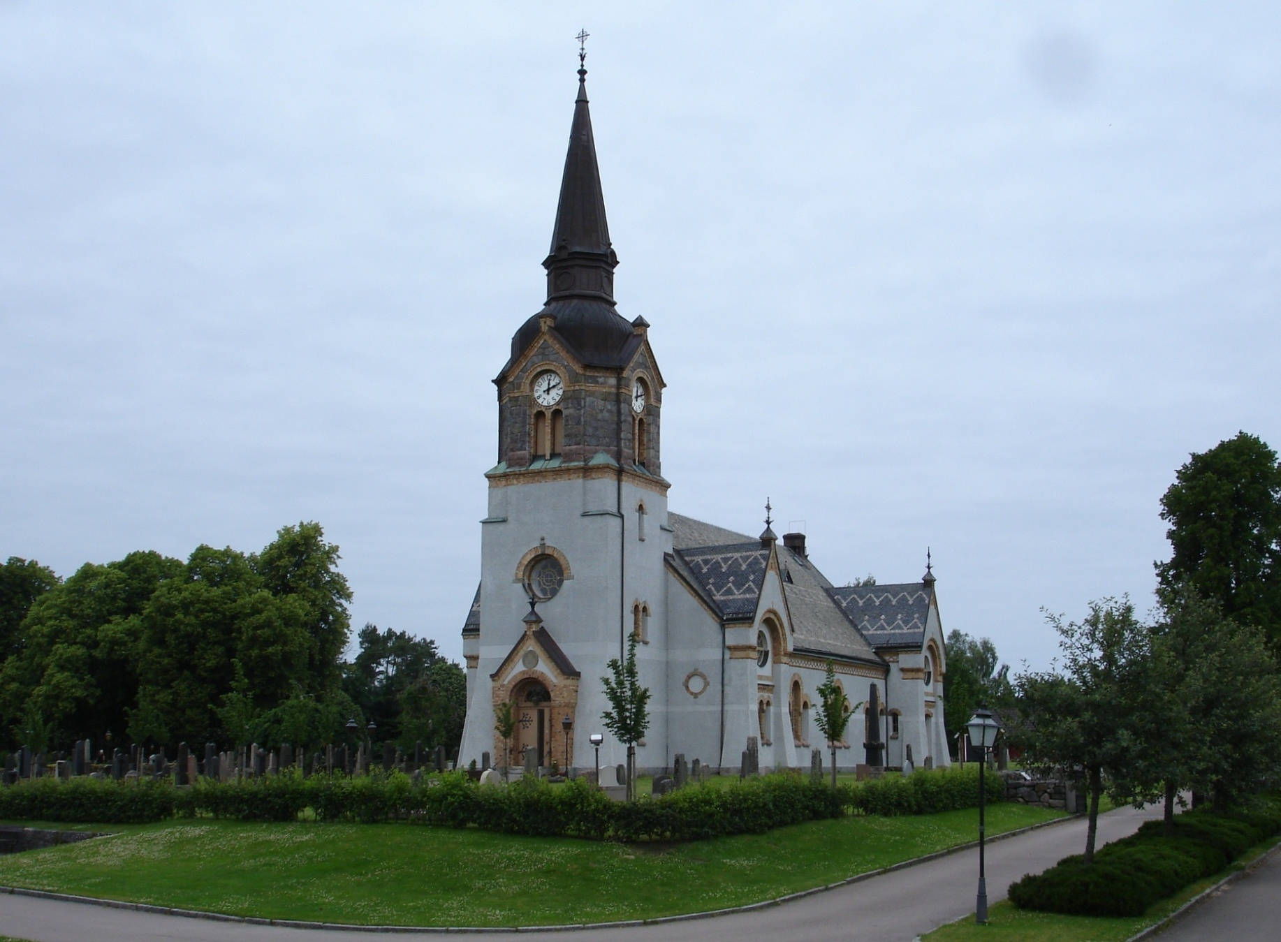 Hishults kyrka i sydöstra Halland i Laholms kommun